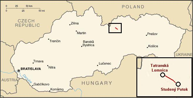 Railway track Studený Potok-Tatranská Lomnica